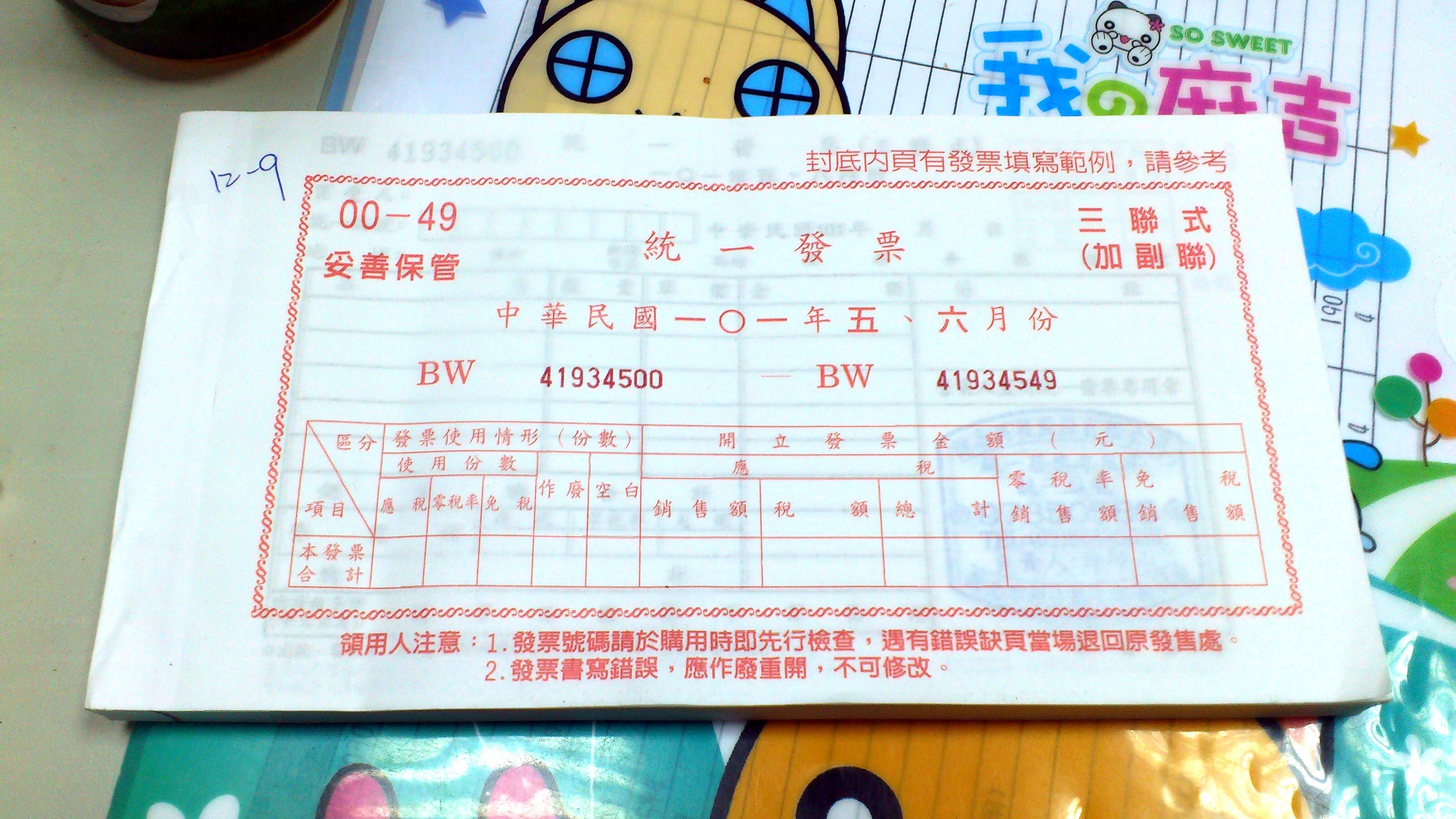 中華民國財政部印刷廠印製的中華民國101年5至6月份三聯式統一發票簿BW41934500－BW41934549。